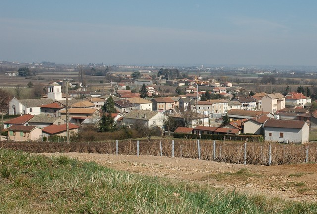 Charentay, Rhône, France Le village. Mars 2005 Cliché: Jean-François BOTTON